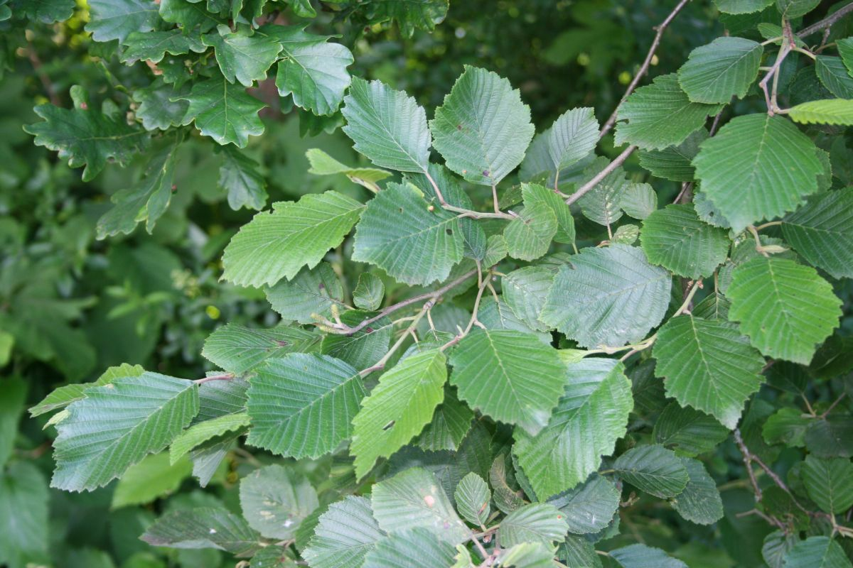 Grau-Erle (Alnus incana subsp. incana), Birkengewächse (Betulaceae) - Österreich/Austria/Autriche: Oberösterreich, Hausruckviertel, Kien NW Attnang-Puchheim